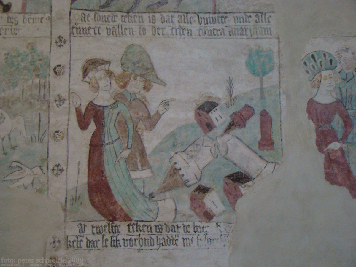 Dorfkirche Altkalen, Wandgemälde